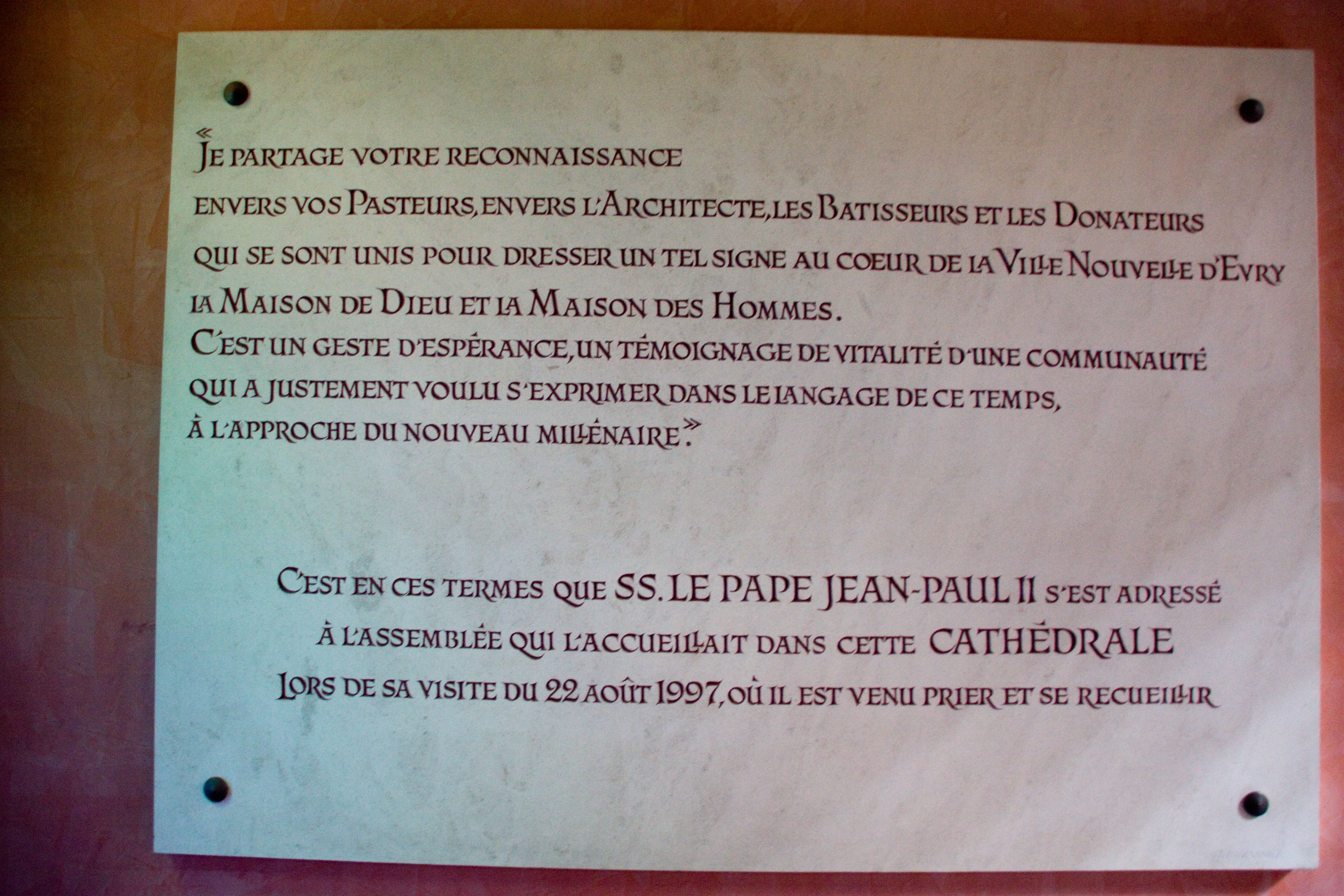 Cathédrale de la Résurrection d'Évry, Diocèse d'Evry - Corbeil-Essonnes, Evry, Essonne, France.